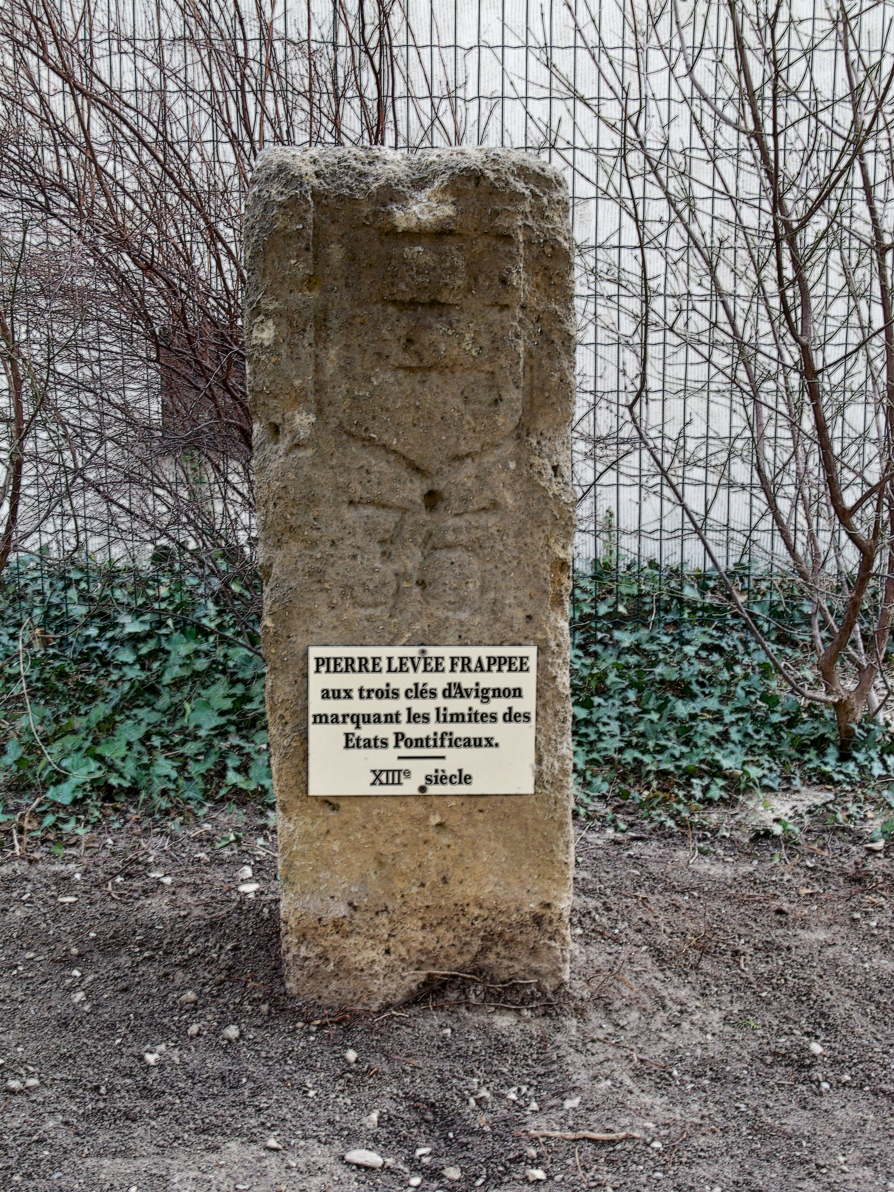 Borne de limite séparative entre les états pontificaux d'Avignon et le Comptat Venaissin (Vaucluse)